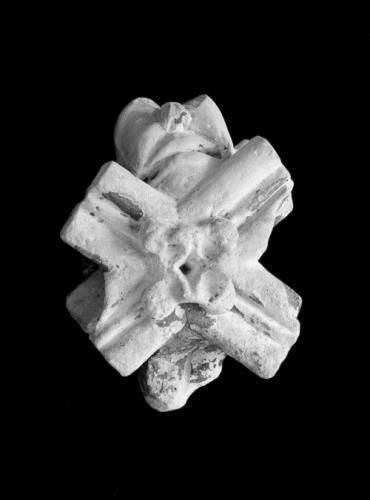 Clé de voute de l'église Sainte-Marine